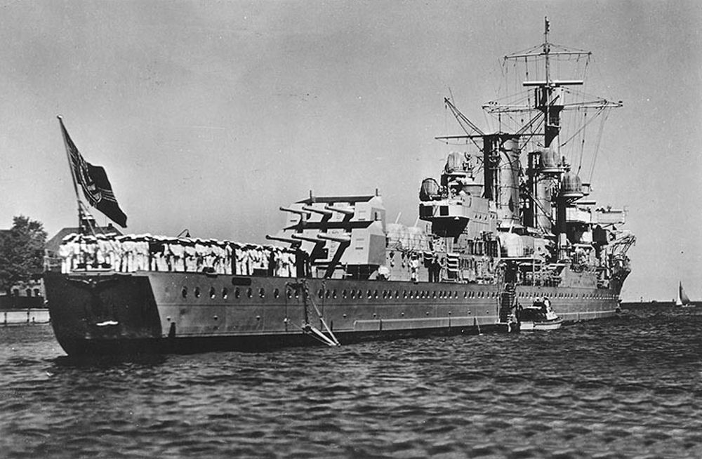 Leichter Kreuzer Königsberg